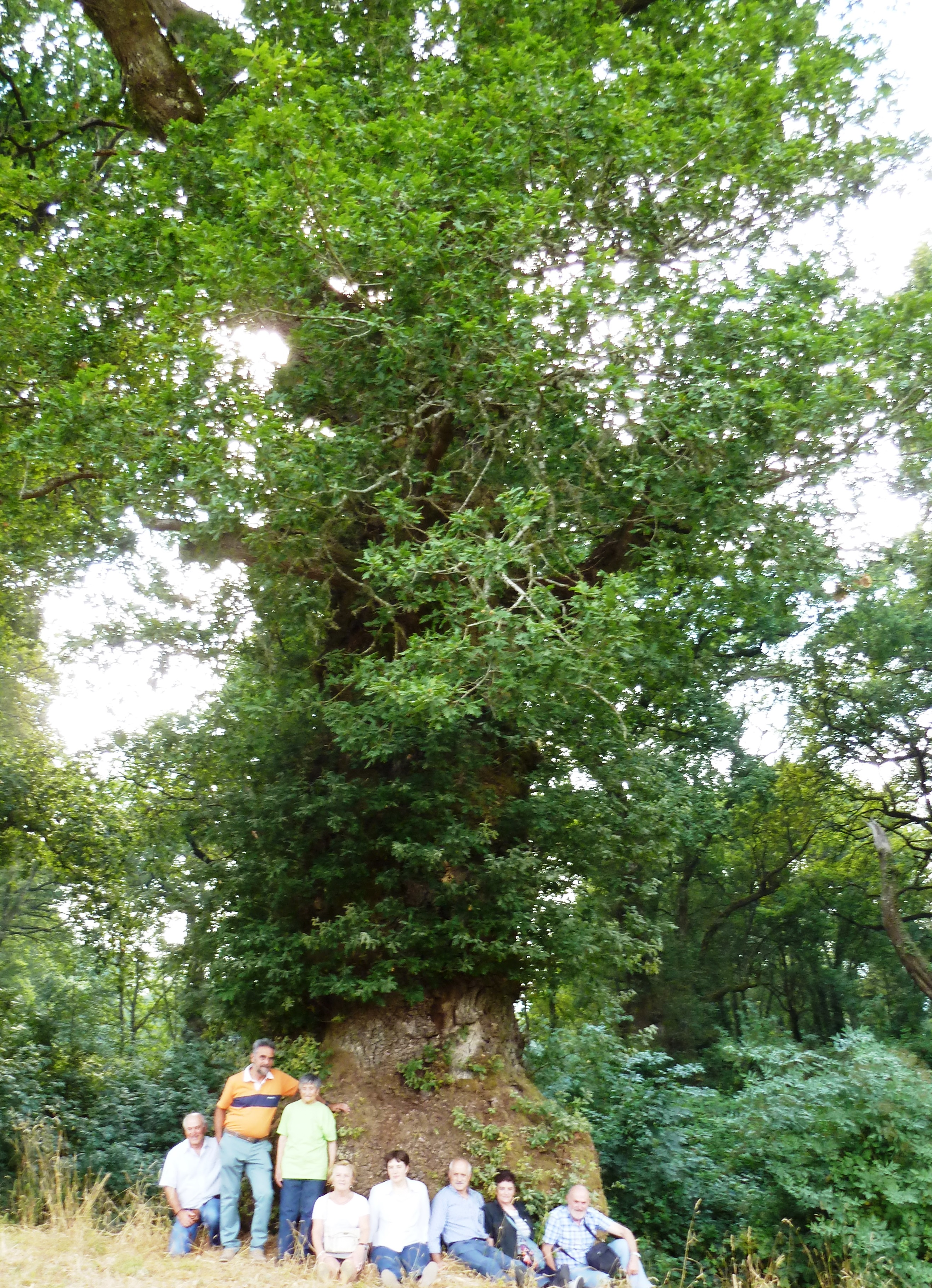 Carballo de Cartelos, Caballedo